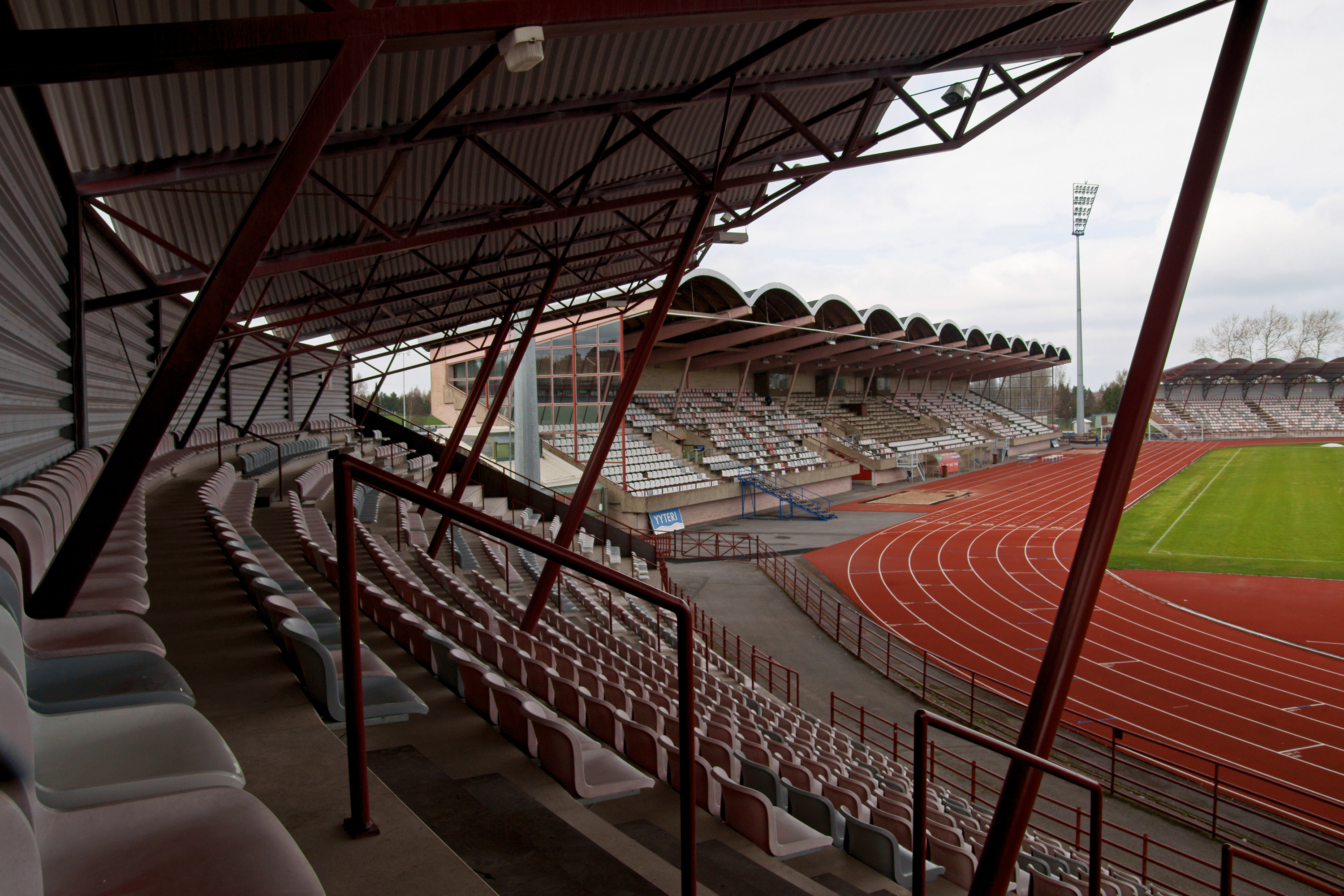 Porin Jalkapallostadion.